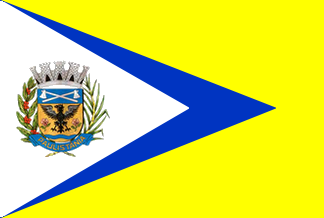 Bandeira de Paulistânia - SP - Brasil.